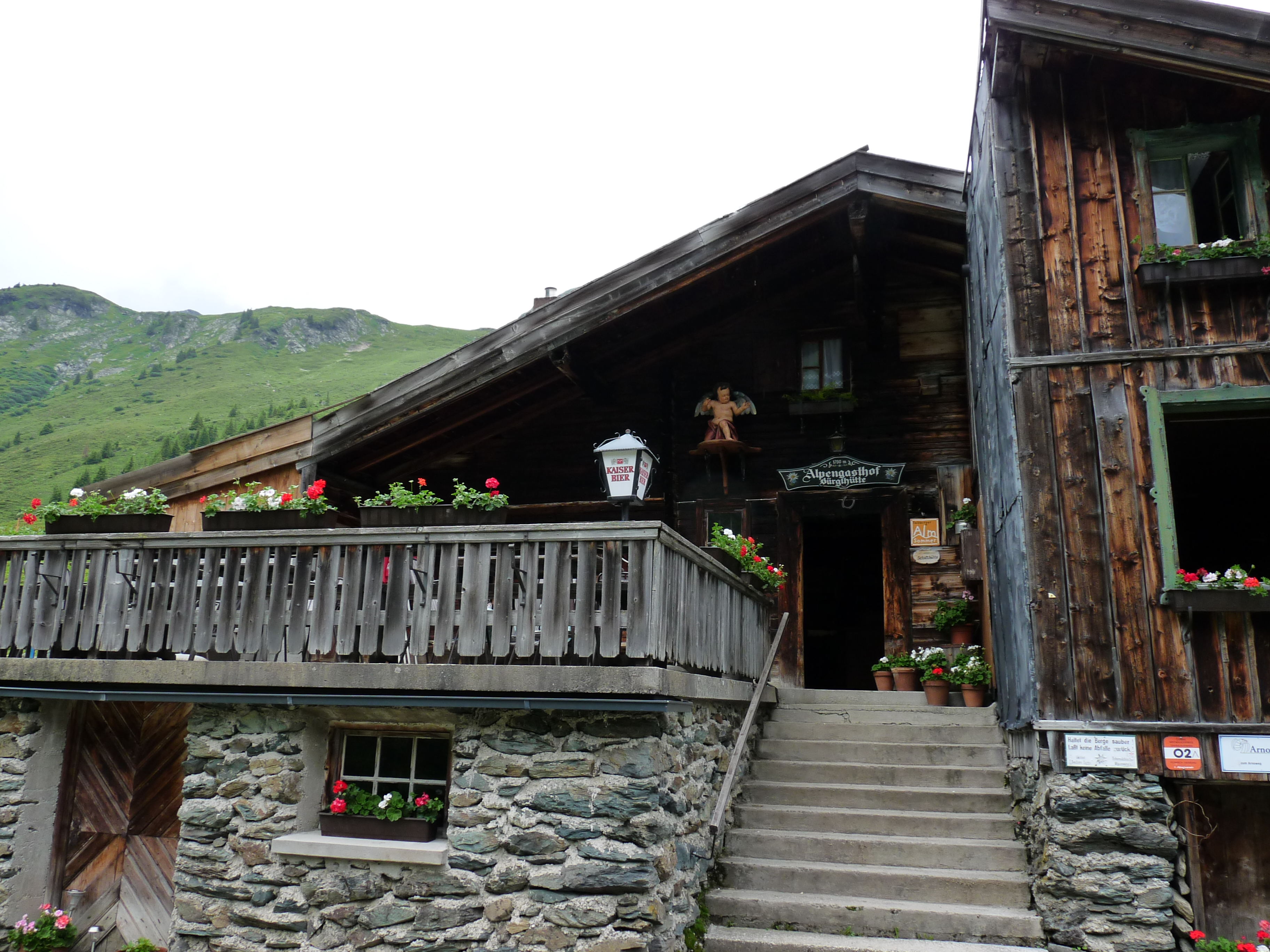 Die Bürglhütte (Alm - Alpengasthof) im österreichischen Bundesland Salzburg